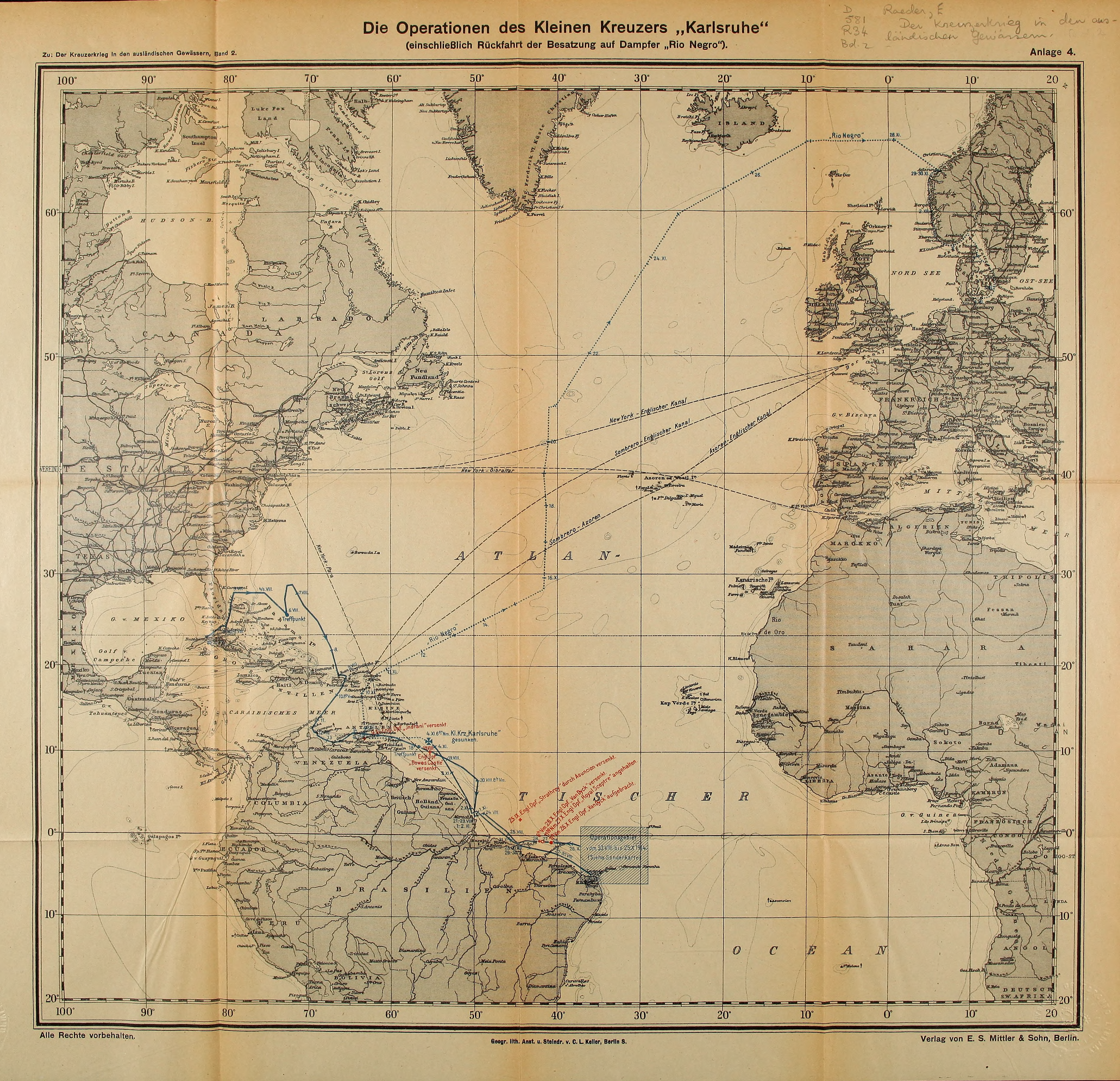 Die Operationen des Kleinen Kreuzers Karlsruhe